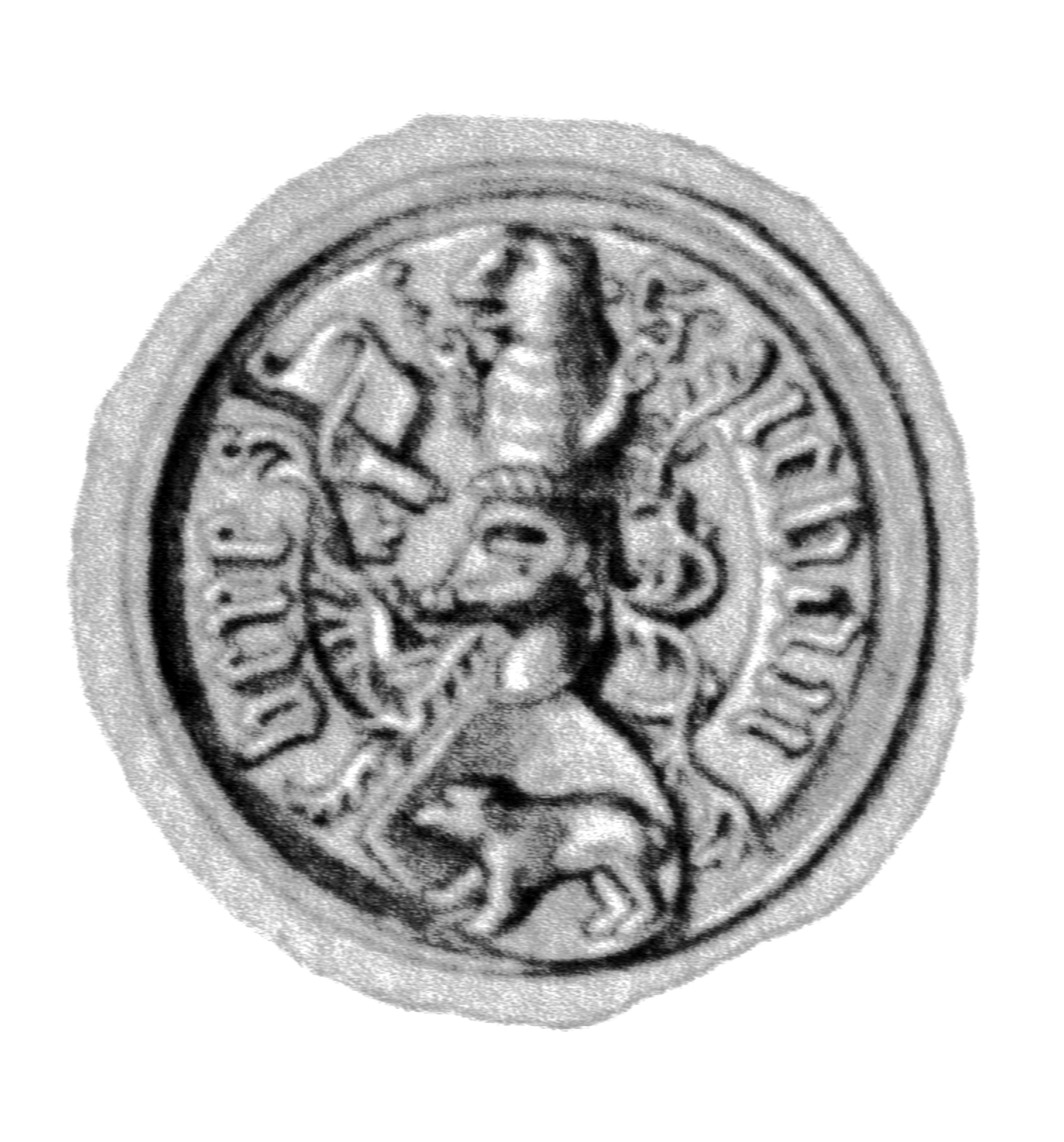 Siegel des Ratsmannes Johann Bere. Das Siegel stammt aus der Zeit um 1498. Siehe Emil Ferdinand Fehling: Lübeckische Ratslinie, Nr. 573 (Johann Bere).